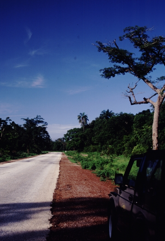 „Africanhighway“ die Straße zwischen Lamin und Tendaba Camp; in der Nähe von Somita